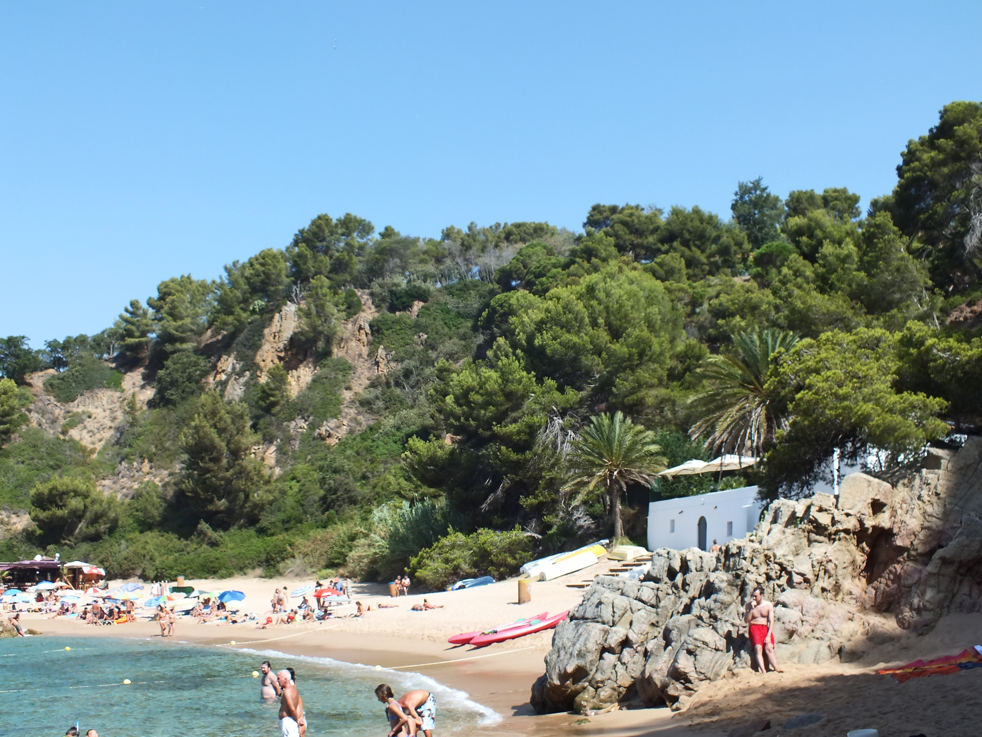 Cala Canyelles